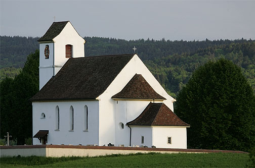 Kirche Sankt Martin in Roggenburg, Kanton Basel-Land, Schweiz